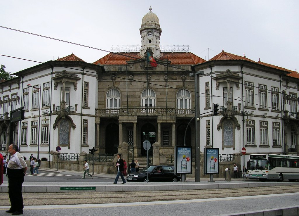 Town hall in Vila Nova de Gaia, Portugal